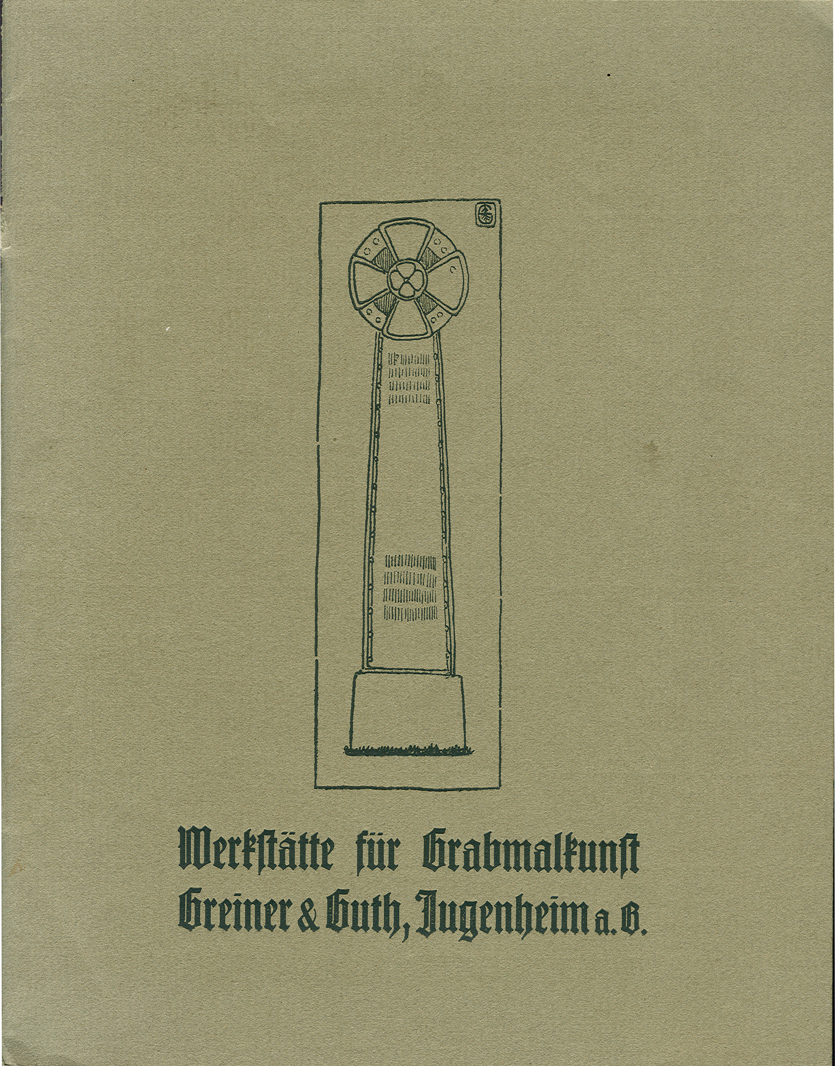 Titelseite des von Daniel Greiner 1909 veröffentlichten Kataloges Werkstätte für Grabmalkunst Greiner & Guth, Jugenheim a. G., mit der Zeichnung einer von Greiner entworfenen Grabstele und der Künstlersignatur des Bildhauers, gedruckt bei Englert & Schlosser in